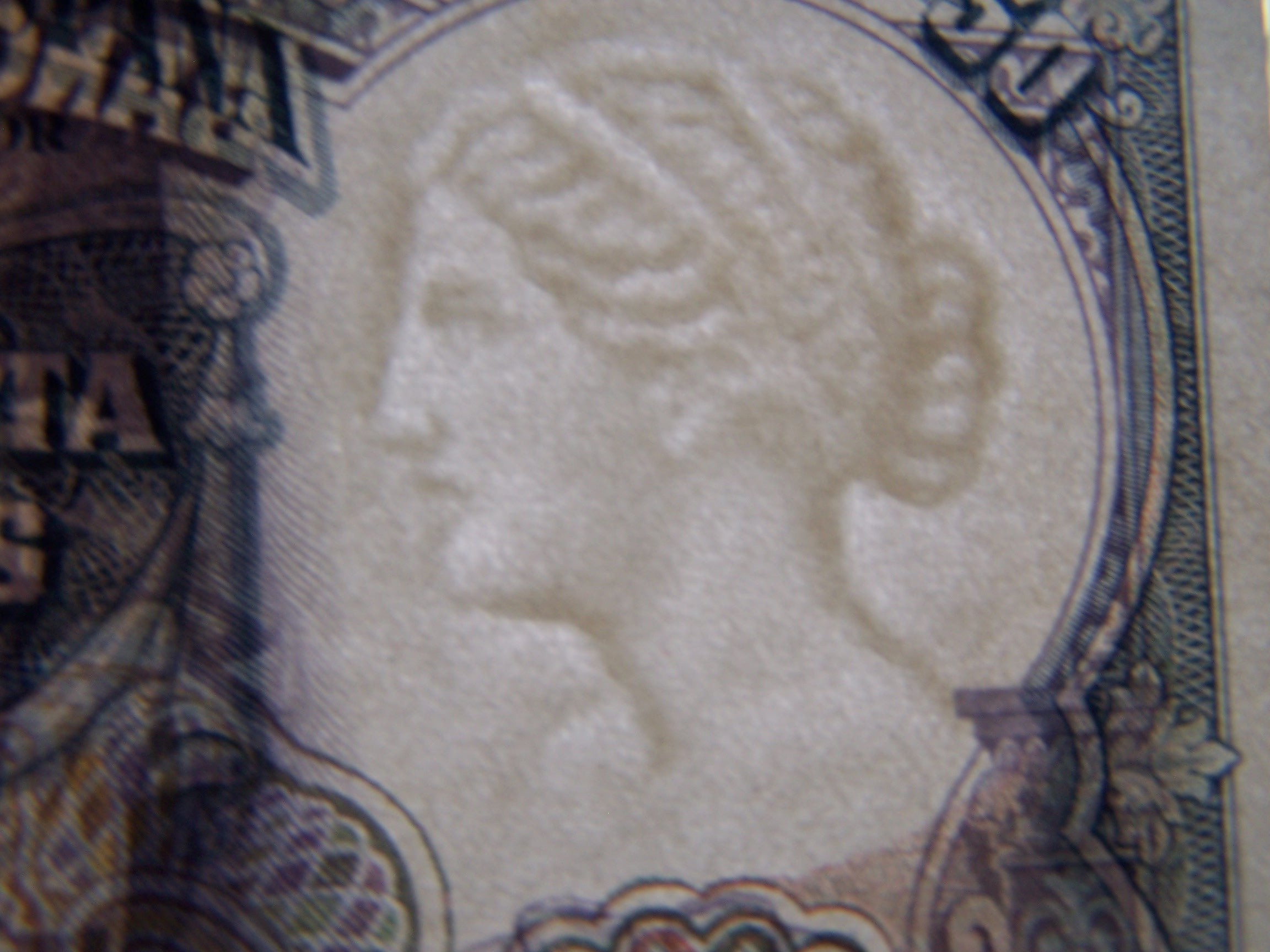 Marca de agua o filigrana del billete de 50 pesetas de 1931